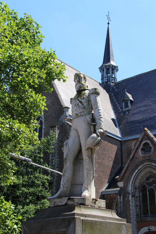 Standbeeld van Leopold II gemaakt van Bentheimer steen (grofkorrelige zandsteen), geplaatst in 1873 naar ontwerp van beeldhouwer Joseph Ducaju als bekroning van een nieuw geplaatste monumentale waterpomp op de locatie van de vroegere schandpaal en bronput. Bij de herinrichting van de Markt werd de pomp afgebroken en het beeld verplaatst naar het midden van het plein. Het is het allereerste standbeeld dat opgericht werd voor de koning. Het werd geplaatst ter herinnering aan het feit dat Leopold II op 11 augustus 1869 bij een bezoek aan het legerkamp van Brasschaat een kort bezoek bracht aan Ekeren.